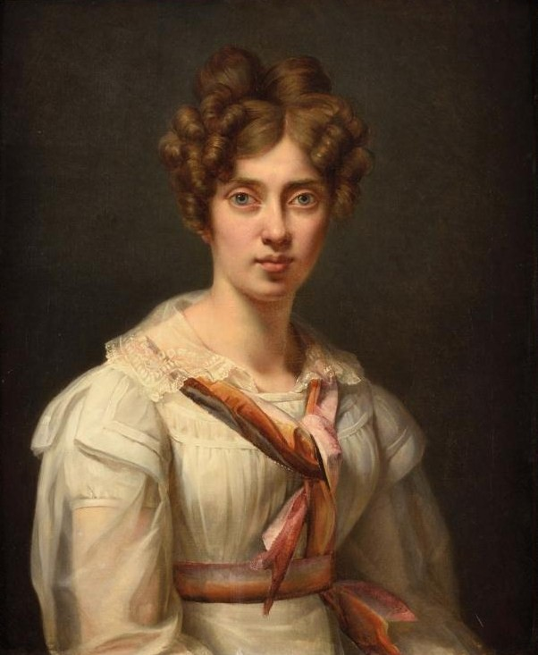 Графиня Ольга Карловна де Сен-При (1807—16.09.1853), с 1829 года жена князя В. А. Долгорукова.